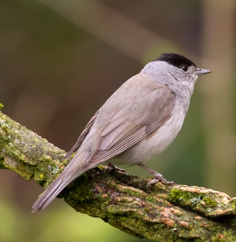 Blackcap 3a